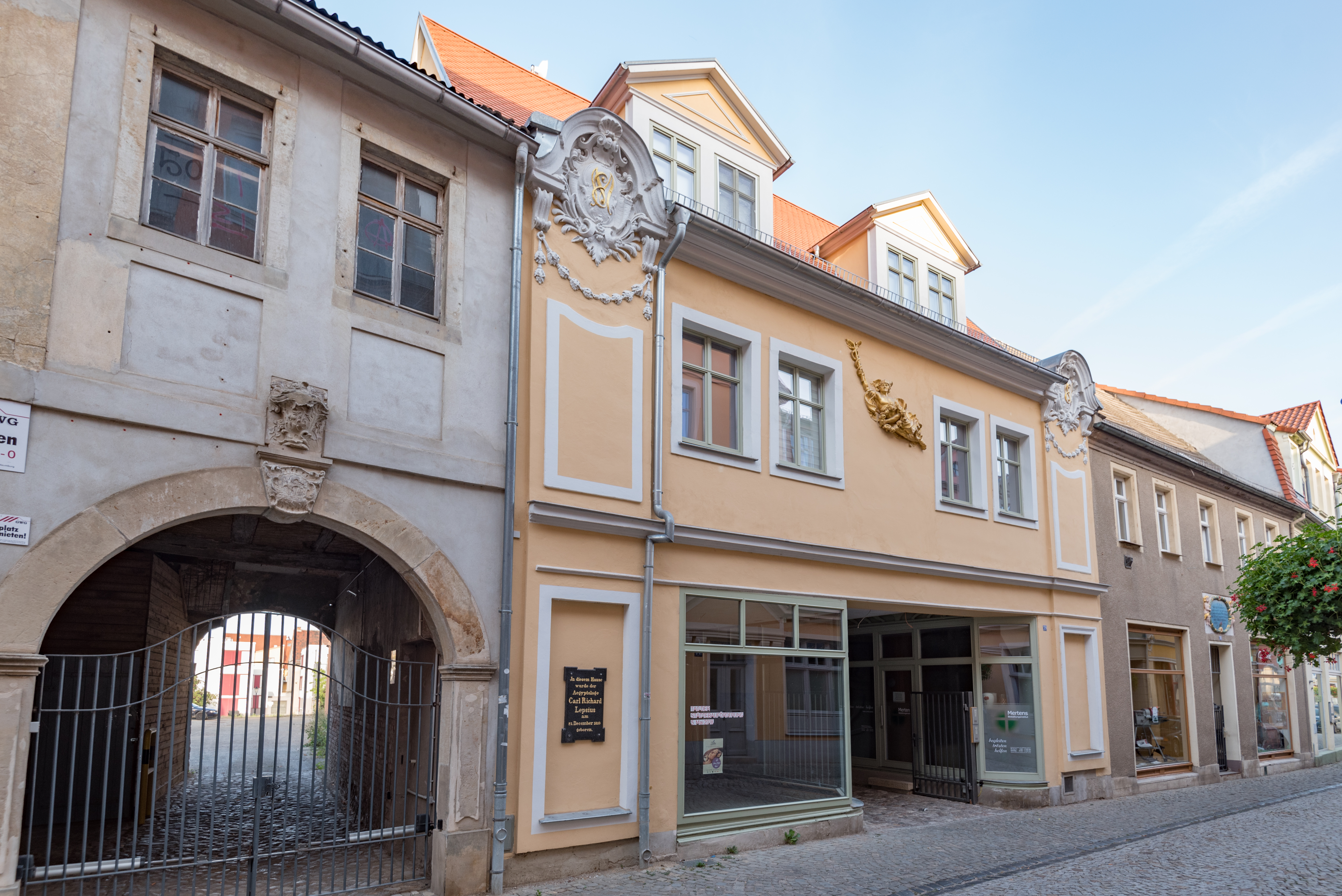 Naumburg (Saale), Wenzelsstraße 39